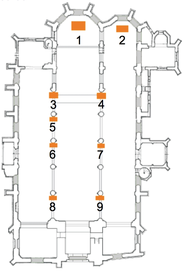 Anordnung der Altäre in der Nikolaikirche Kalkar. Nach einer Skizze in der Webpräsenz der Kirchgemeinde. Hochaltar Sieben-Schmerzen-Altar Georgsaltar Marienaltar Crispinus-Crispinianus-Altar Dreifaltigkeitsaltar Johannesaltar Jakobusaltar Annenaltar